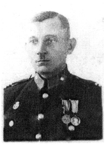 Wojciech Cwojdziński uczestnik powstania wielkopolskiego i bitwy w 1920, aspirant PP, zamordowany w Twerze w 1940 przez NKWD.